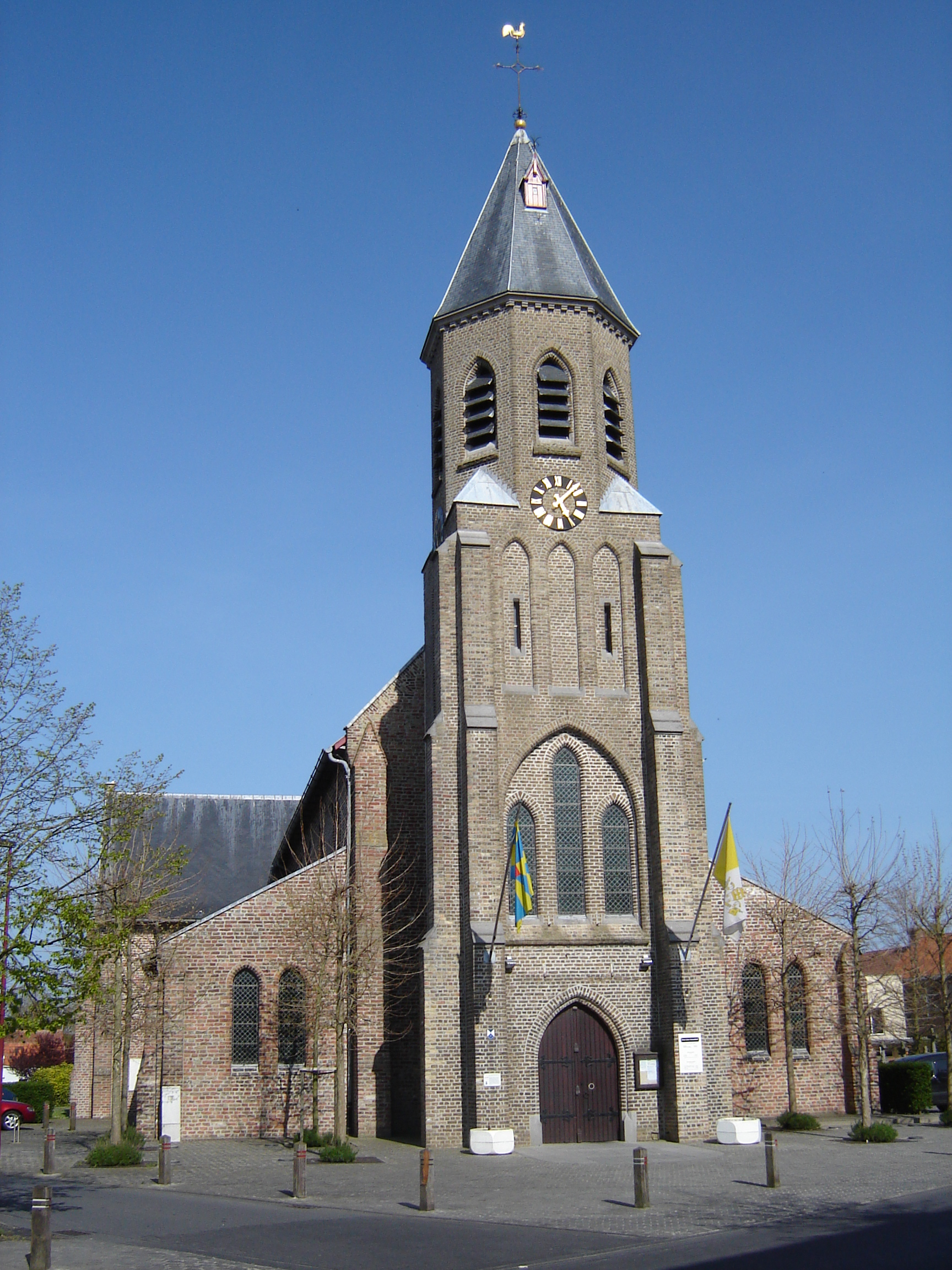 Onze-Lieve-Vrouwekerk van ZandvoordeChurch of Our Lady in Zandvoorde, Ostend, West Flanders, Belgium